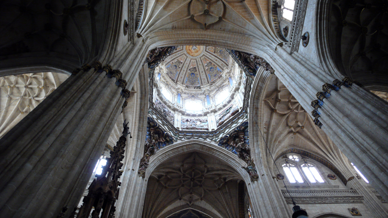 Interior de la Catedral Nueva de Salamanca. Cúpula barroca.